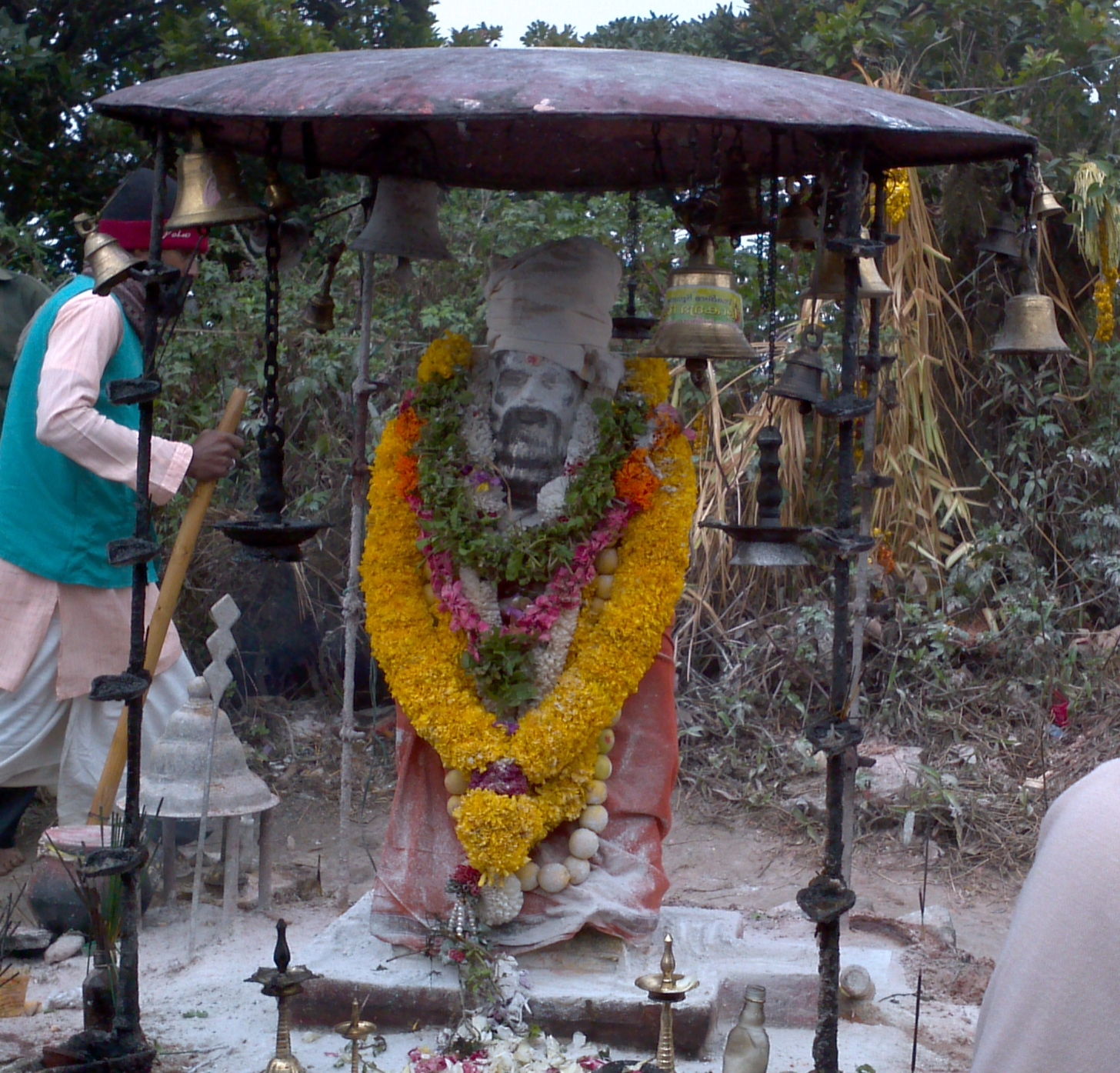 അഗസ്ത്യകൂടത്തിലെ അഗസ്ത്യമുനിയുടെ പ്രതിഷ്ഠ